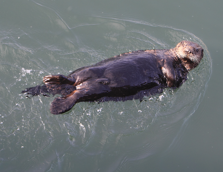 アジアラッコ クーちゃん 釧路市幣舞橋付近